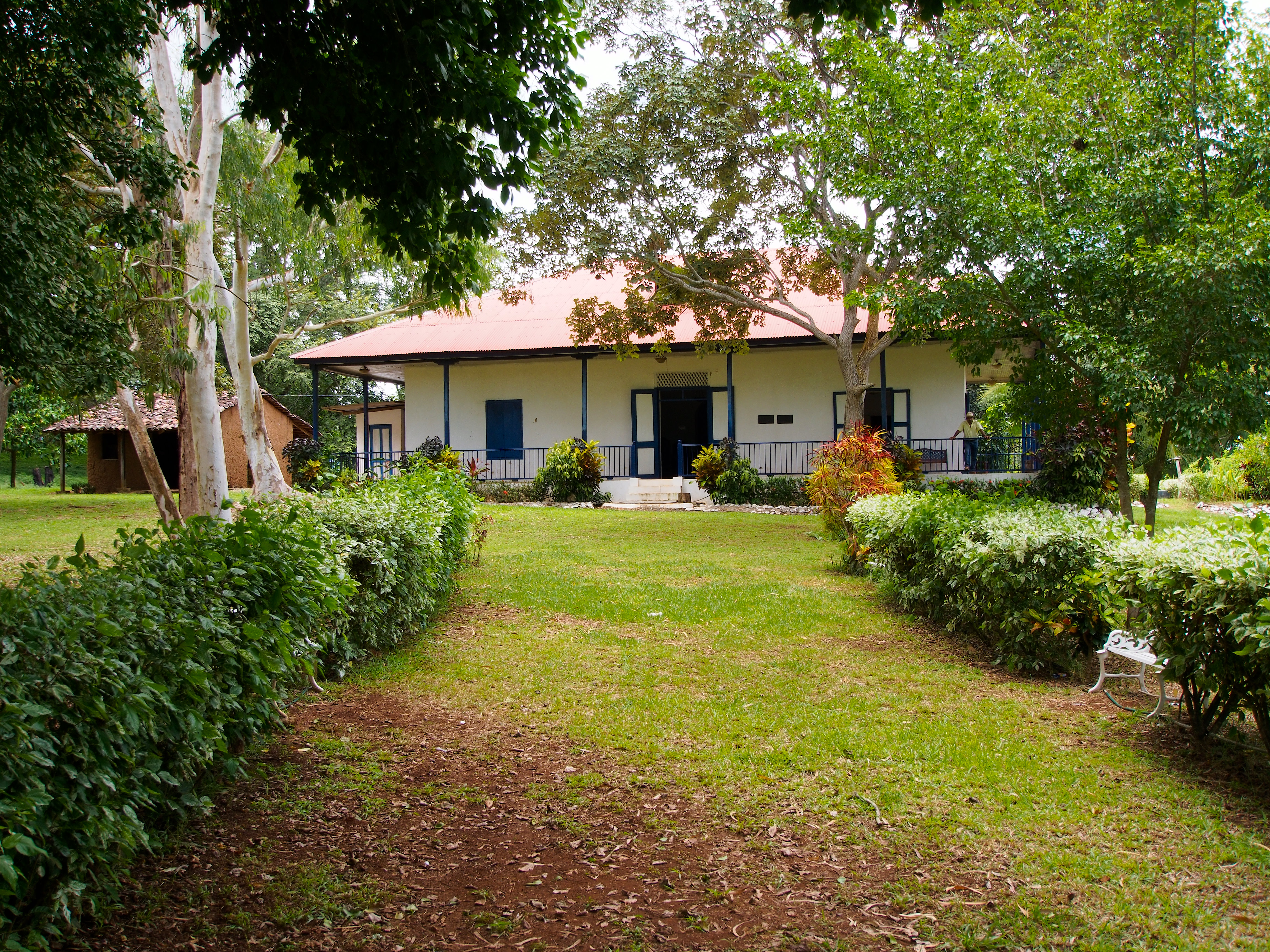 Casa de campo del Dr. Belisario Porras.